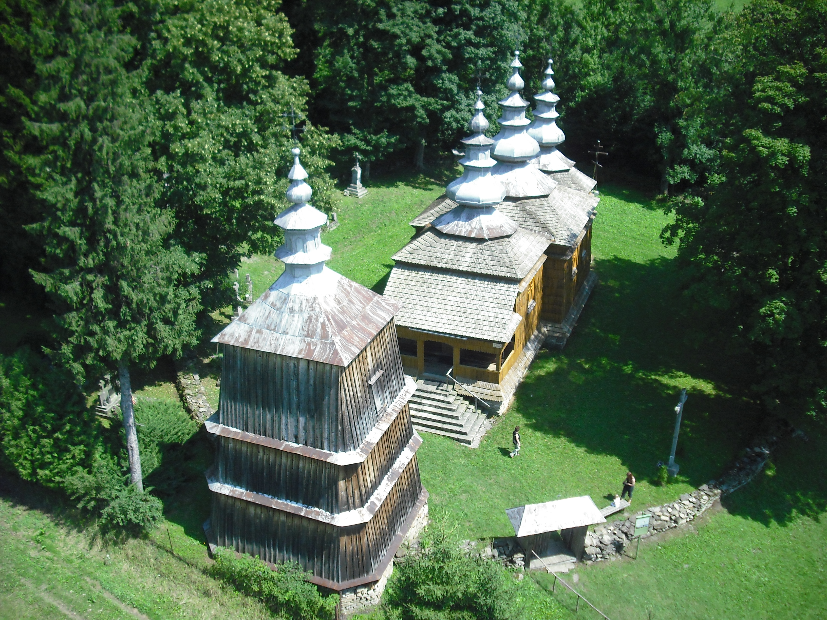 Rzepedź - zespół cerkwi greckokatolickiej pw. św. Mikołaja obecnie kaplicy rzymskokatolickiej, 1824